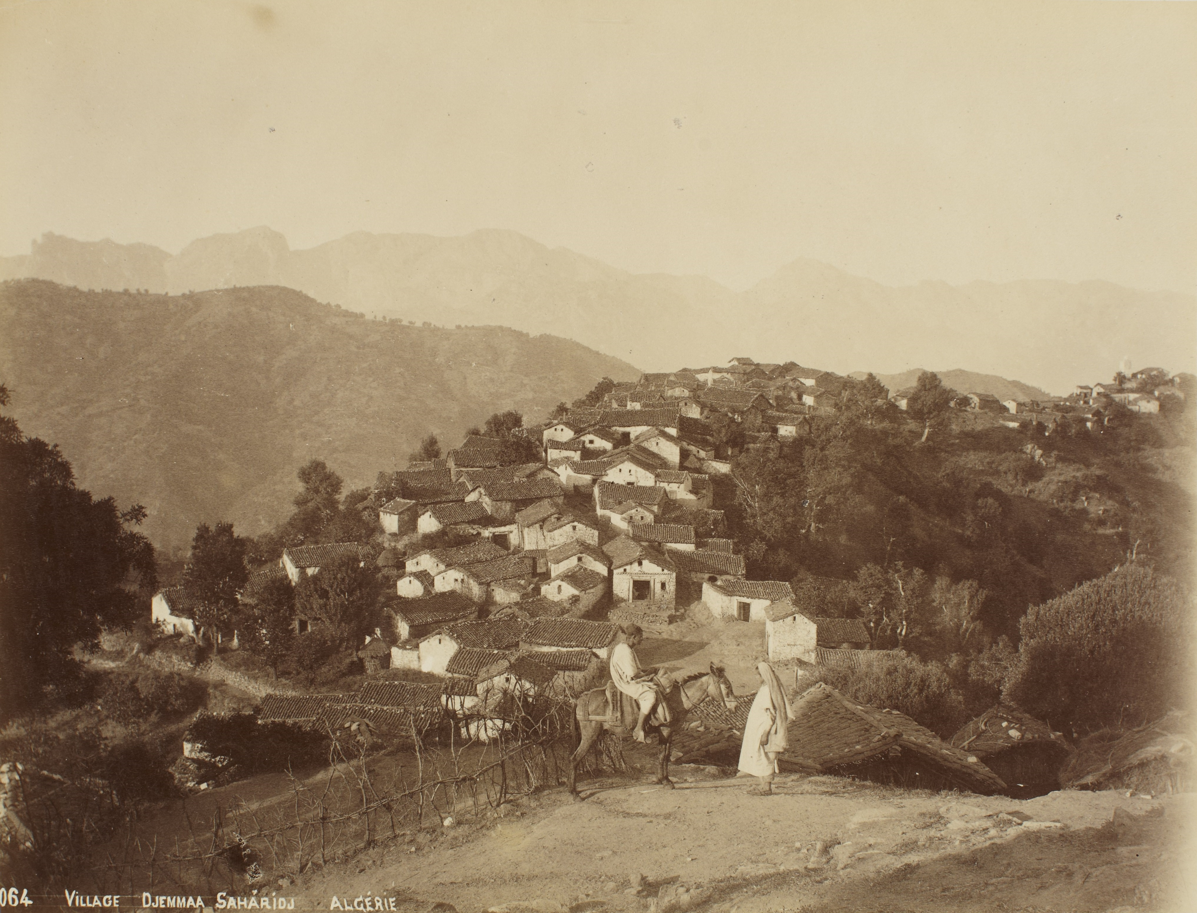 Vue du village de Djemâa Saharidj vers 1899. Photo détourée.